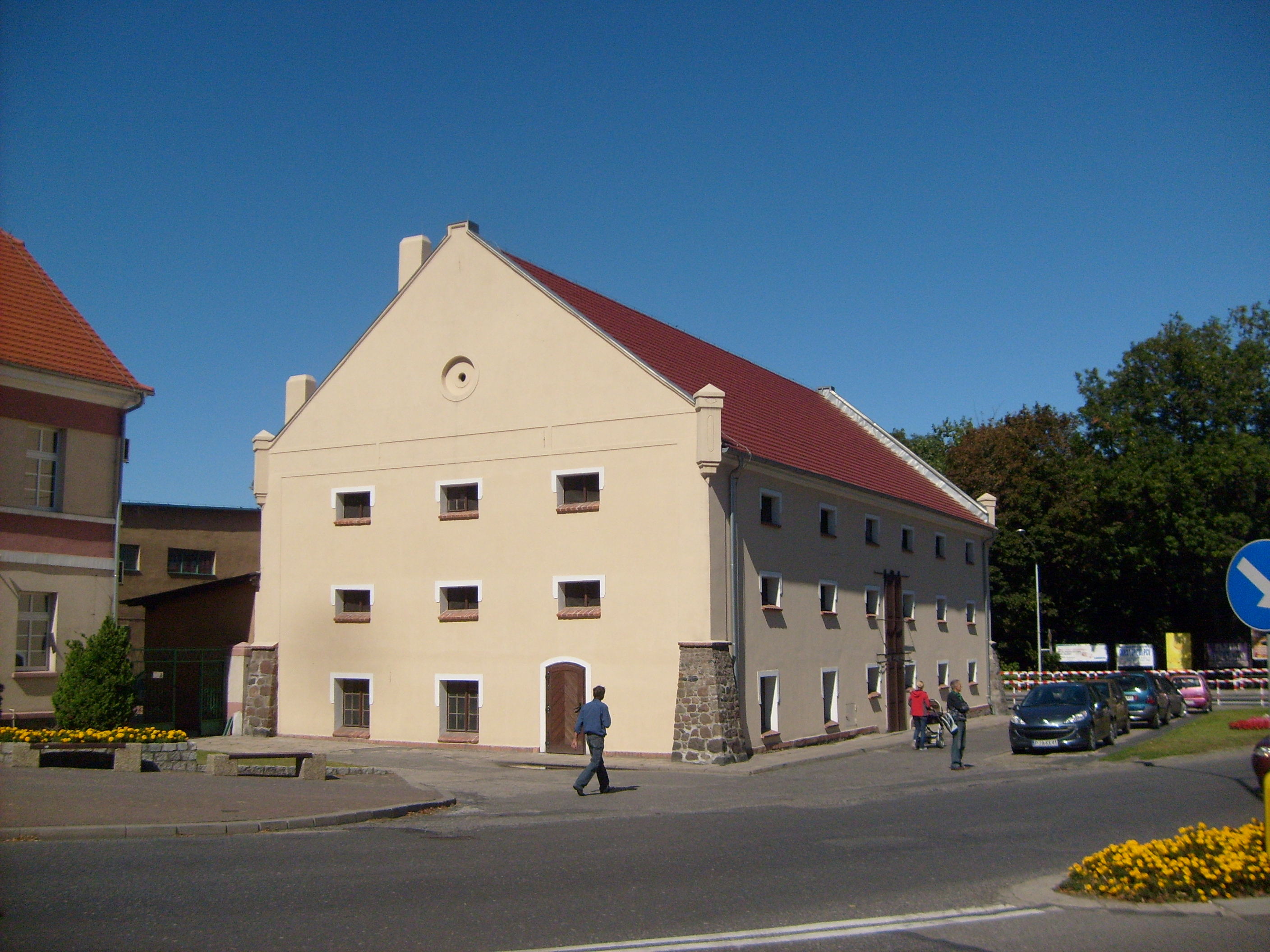 Spichlerz Polskiego Rocka w Jarocinie, stan na lipiec 2013